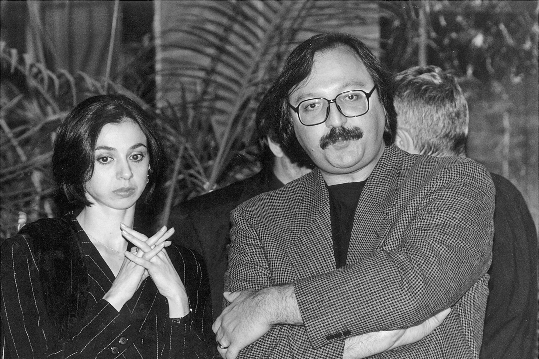 Нино Ананиашвили с мужем Григолом Вашадзе